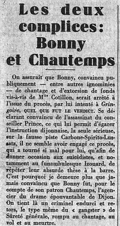 Léon Daudet affirme la culpabilité de Pierre Bonny dans l'assassinat du conseiller Prince, selon lui ordonné par Camille Chautemps. L'action française, 2 décembre 1934